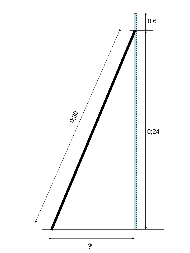 Illustration zu ein problem auf einer babylonischer Keilschrifttafel (Britisches Museum 85196, London)